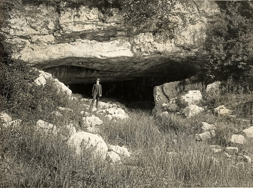 Razglednica Velike Karlovice.